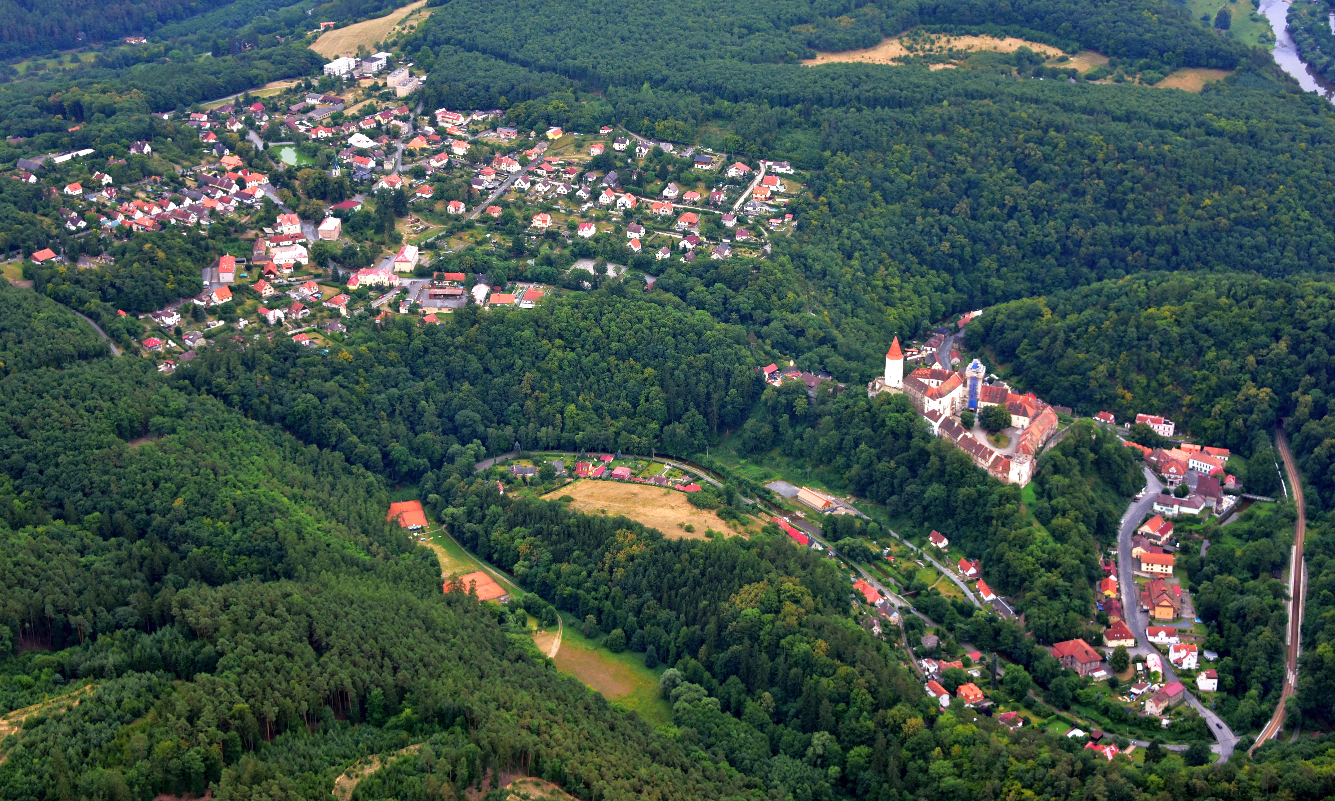 Křivoklát, Luftaufnahme (2018)